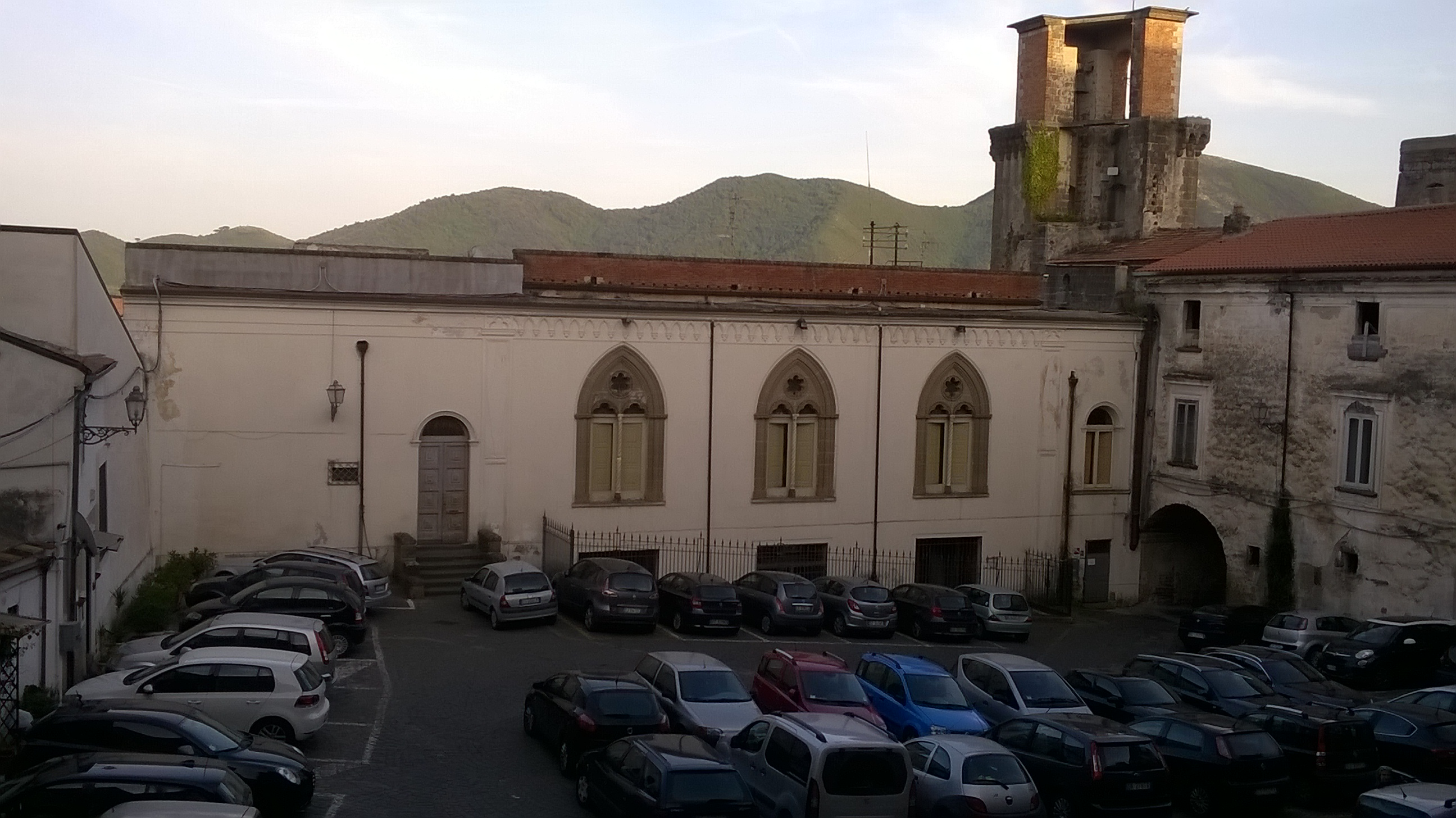 Municipio